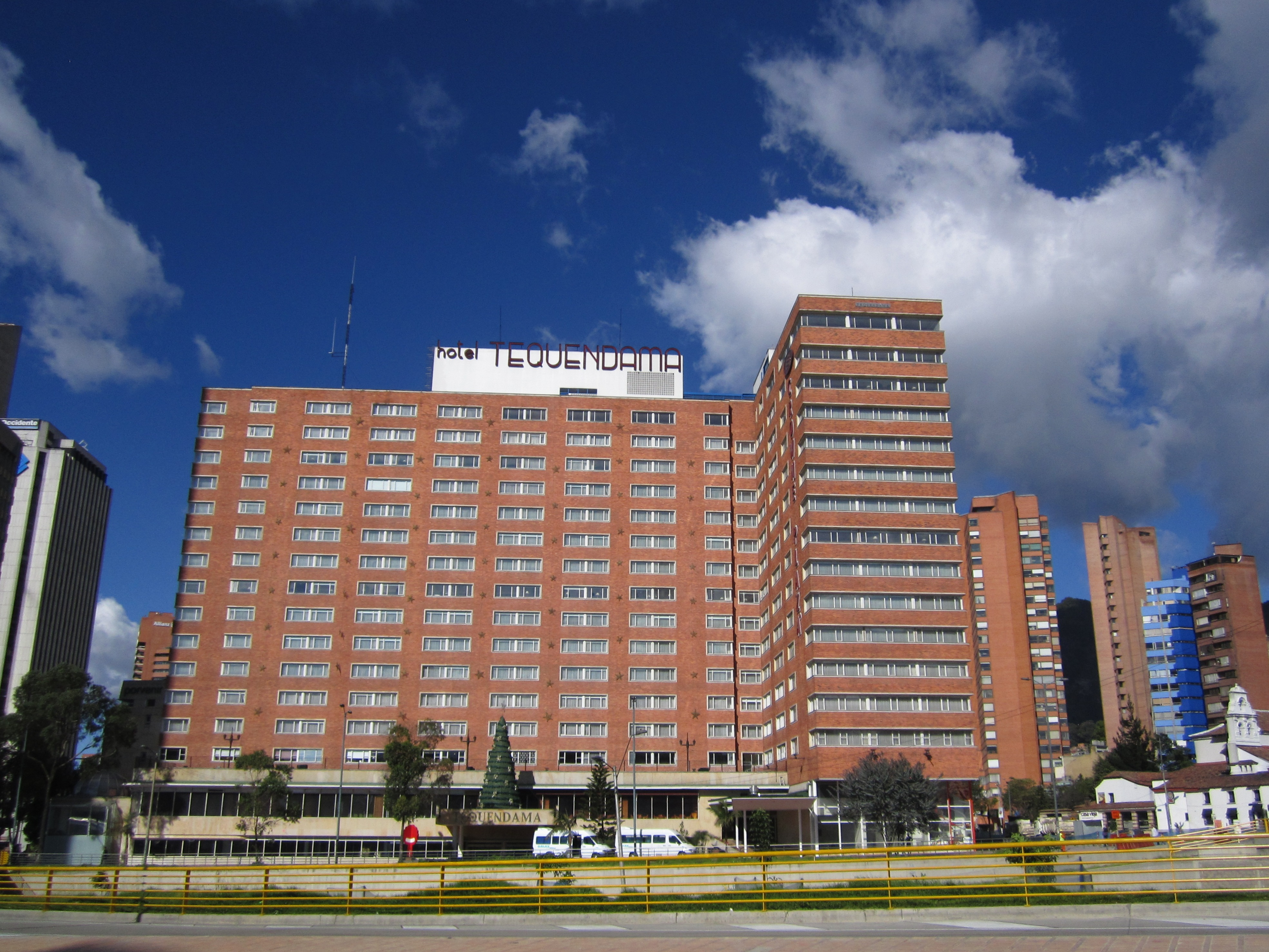 Costado sur del Hotel Tequendama, Bogotá.